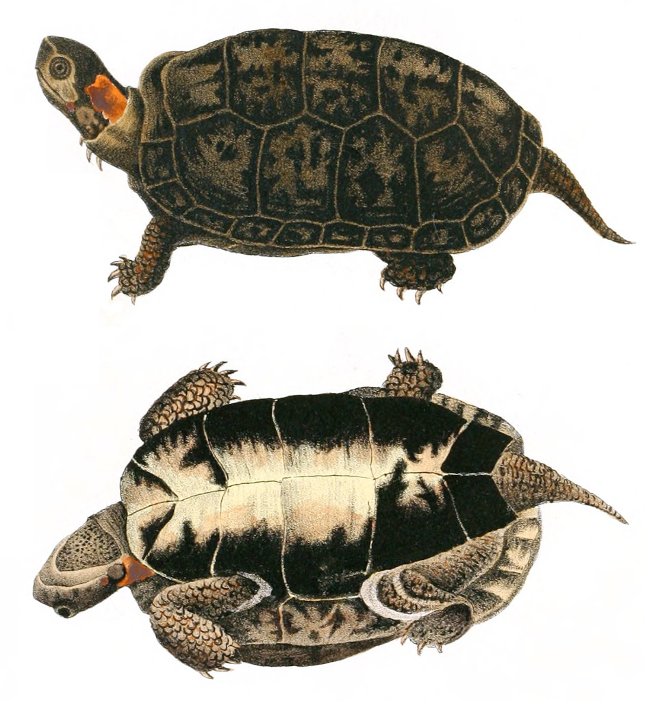 Bog Turtle, Glyptemys muhlenbergii